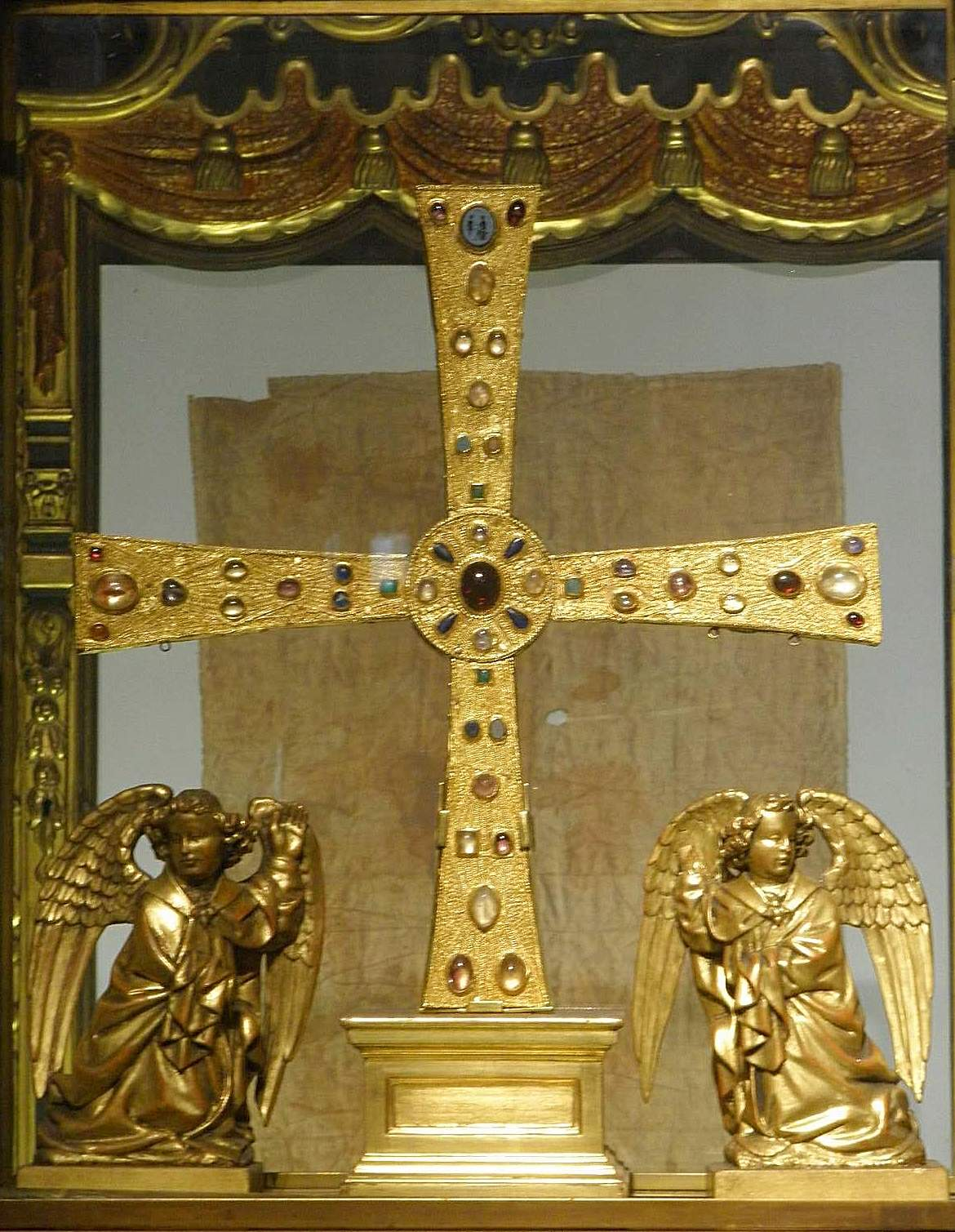 Cruz de los Ángeles, conservada en el interior de la Cámara Santa de Oviedo.